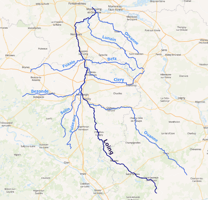 carte réalisée sur umap This map may be incomplete, and may contain errors. Don't rely solely on it for navigation.